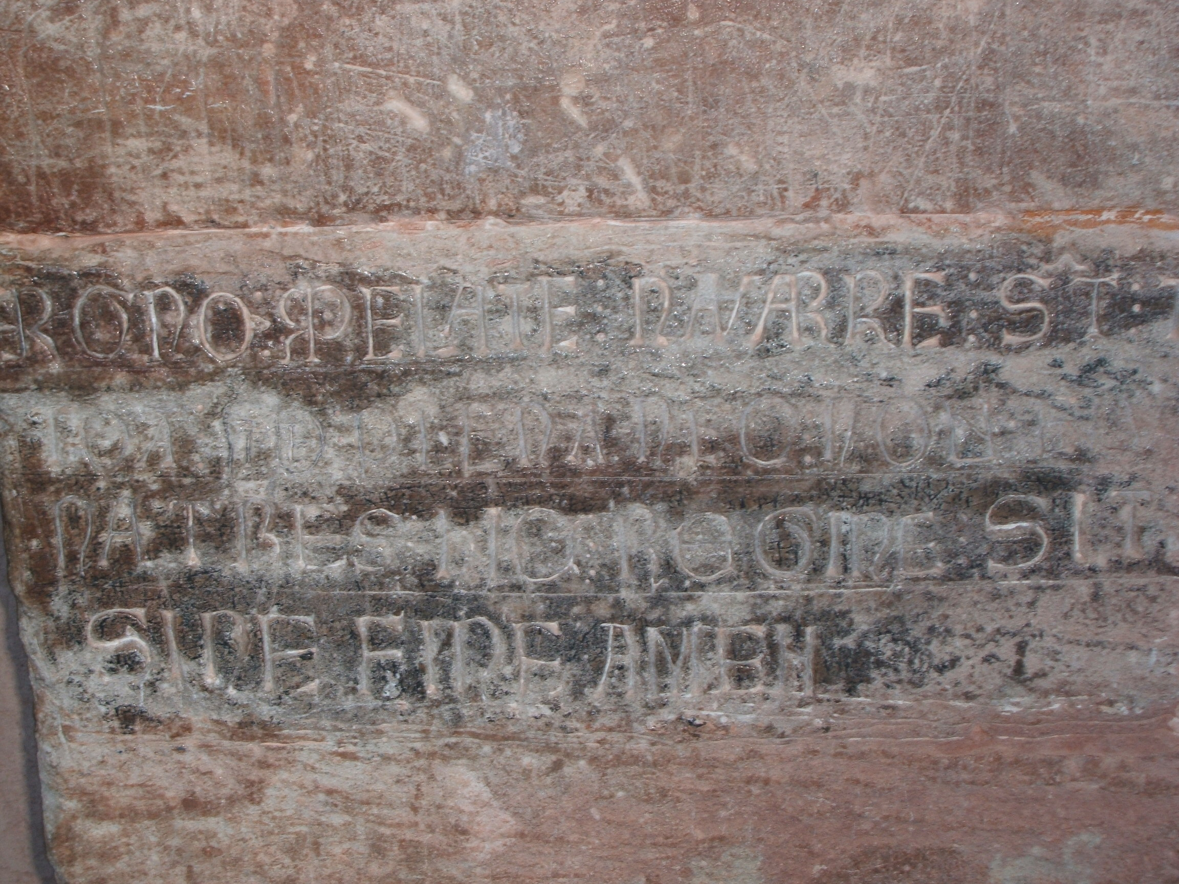 Inscripción junto al sepulcro de la reina navarra Toda en el Monasterio de Suso, entonces Reino de Navarra y actualmente provincia de La Rioja.